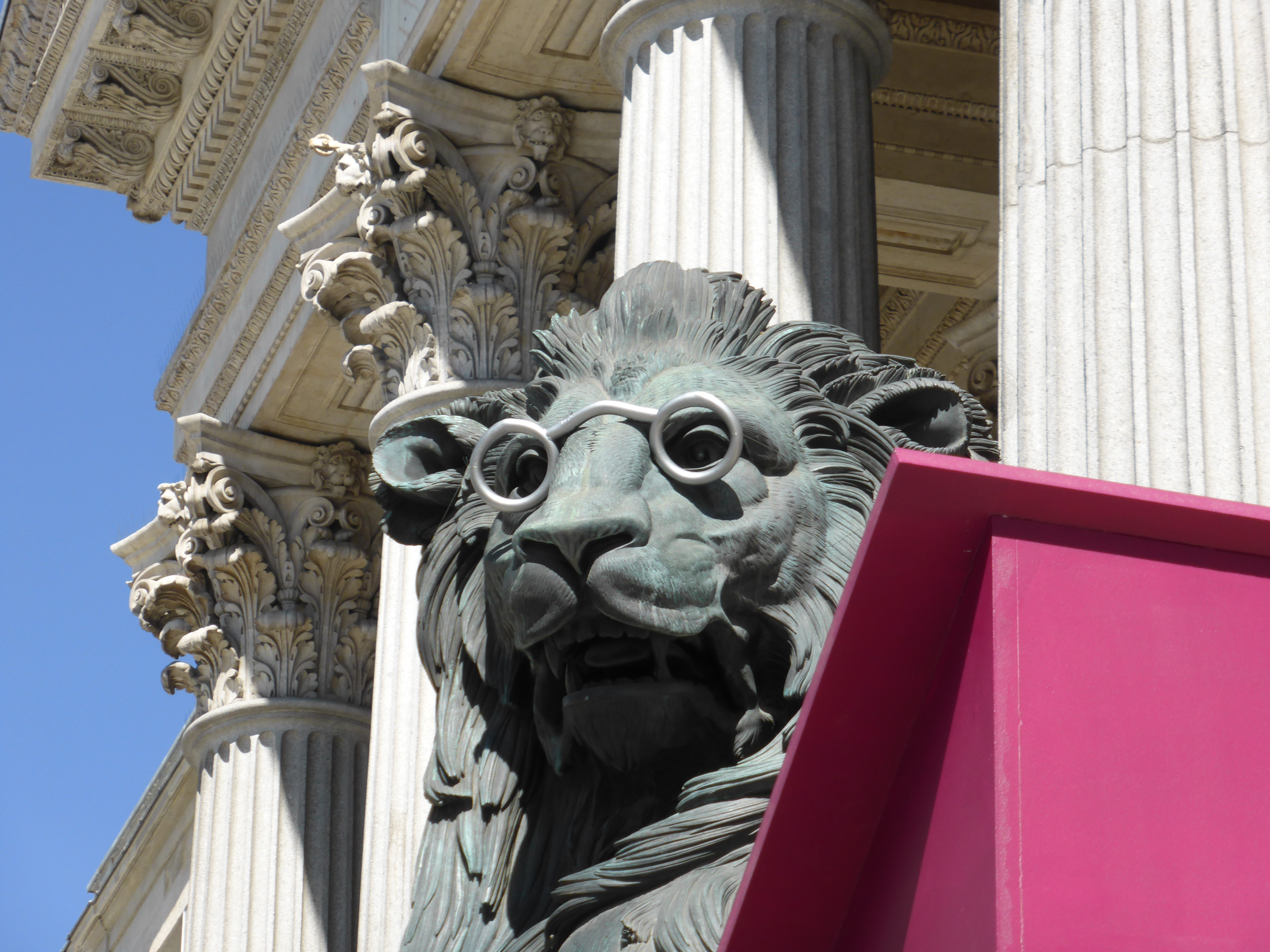 Temporalmente, los dos leones de bronce del Congreso de los Diputados (Madrid, España) lucen unas gafas (anteojos, lentes, quevedos, o espejuelos), para simular que leen El Quijote de Cervantes. Es en conmemoración del 400 aniversario de la muerte de Miguel de Cervantes.